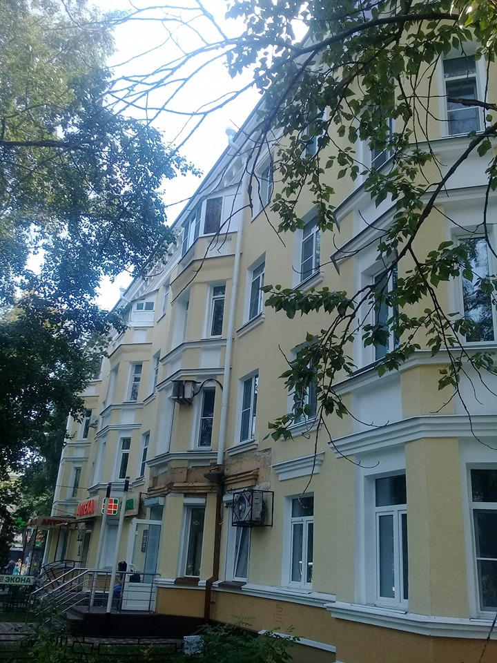 Жилой дом 1957 года постройки. г. Воронеж, ул. Богдана Хмельницкого д. 38.